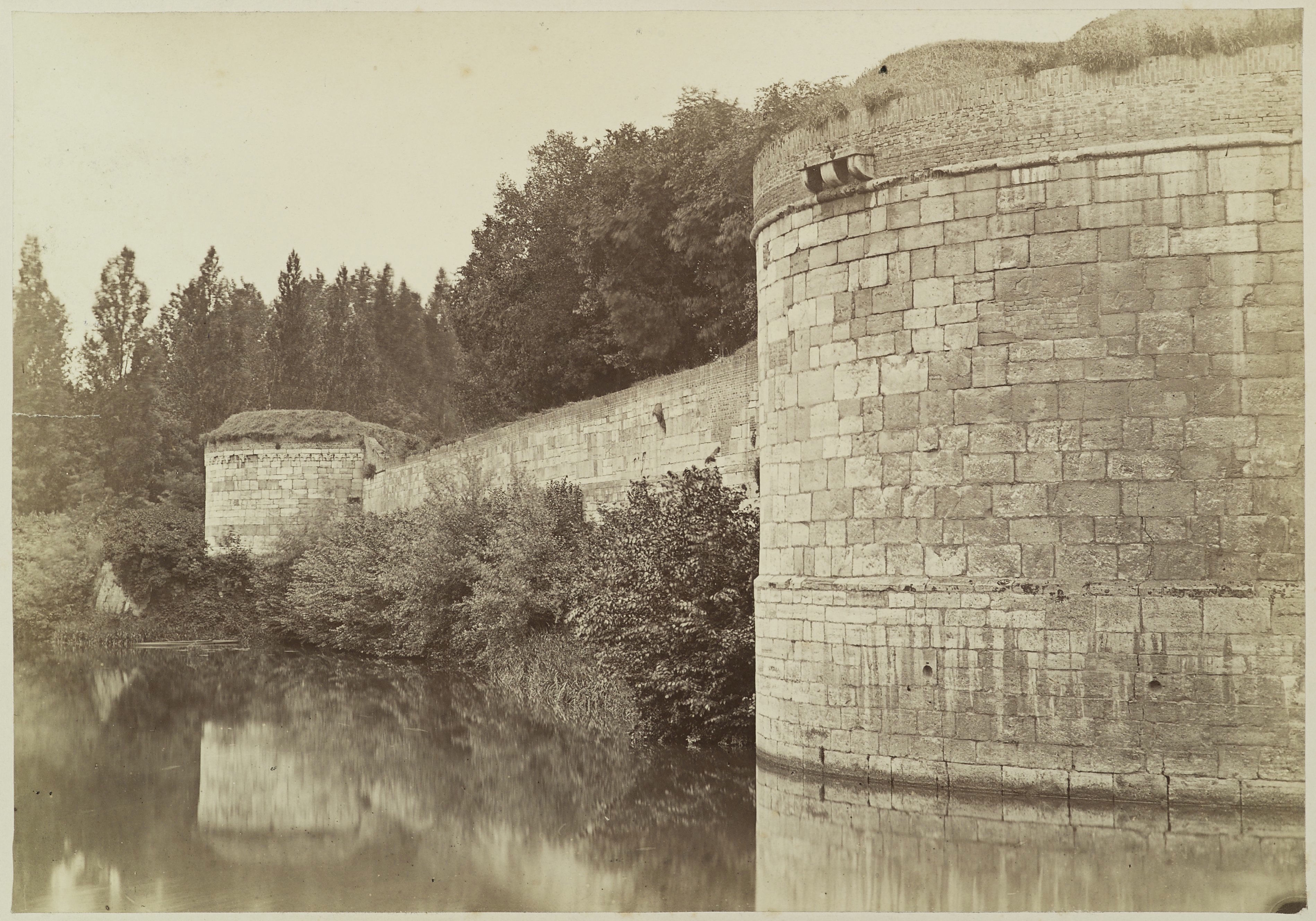 De stadsmuur tussen de rondelen Haet ende Nijt en De Vijf Koppen vóór de bouw van de Poort Waerachtig (ca 1888) (Uit reeks: Ontmanteling van Maastricht)